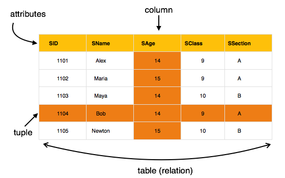 Монгол: Зураг 3 -Relational mode